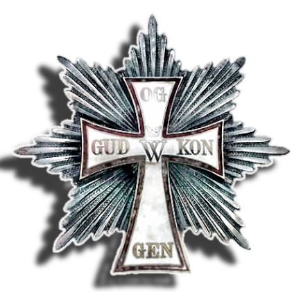 Dannebrogin suurristin rintatähti.